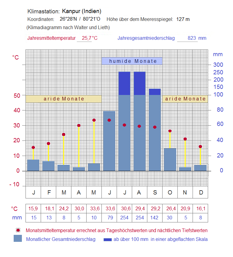 Monsunklima in Indien: Klimastation Kanpur